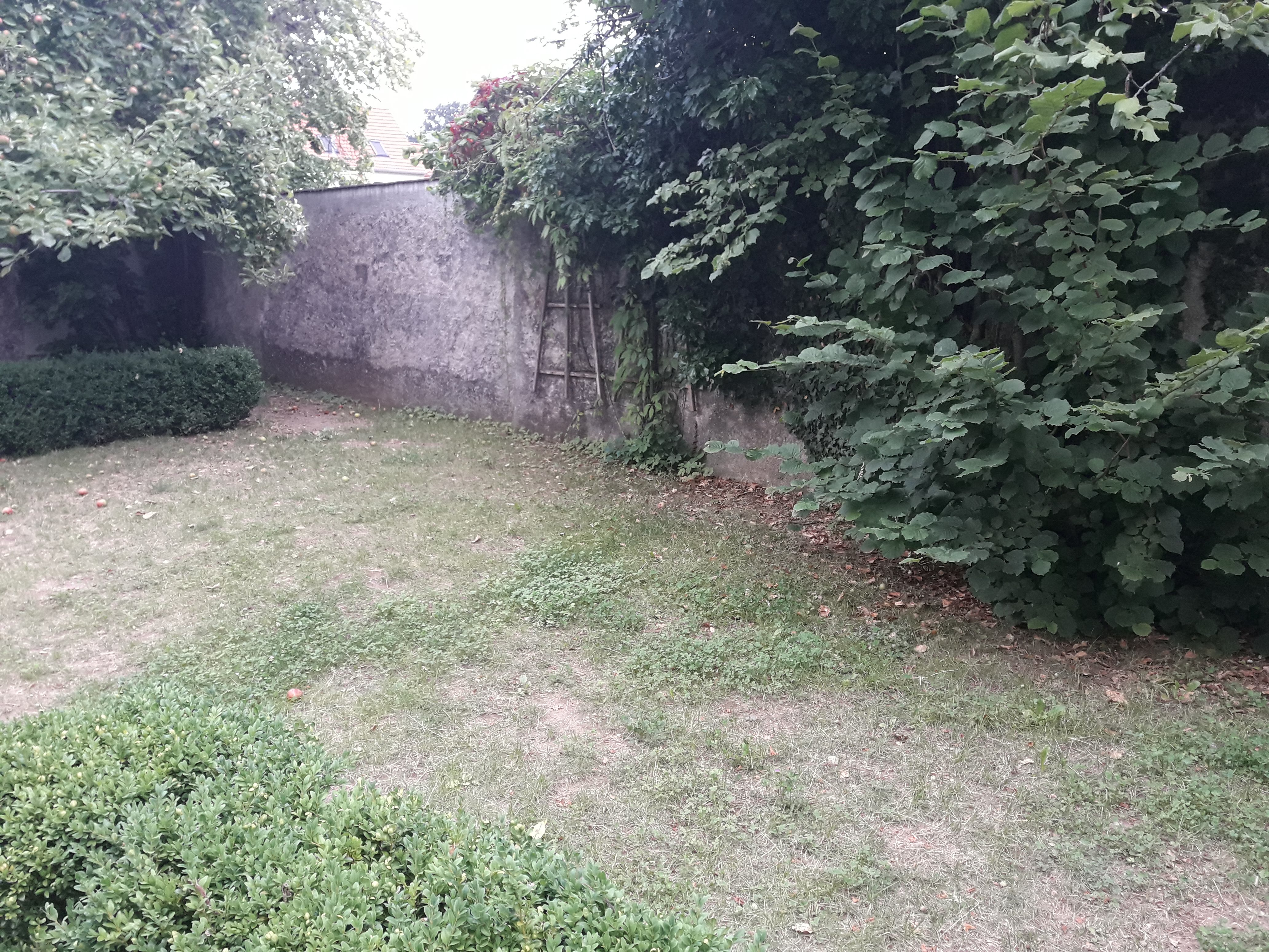 Ringmauer Allodium Cronheim (Osten)